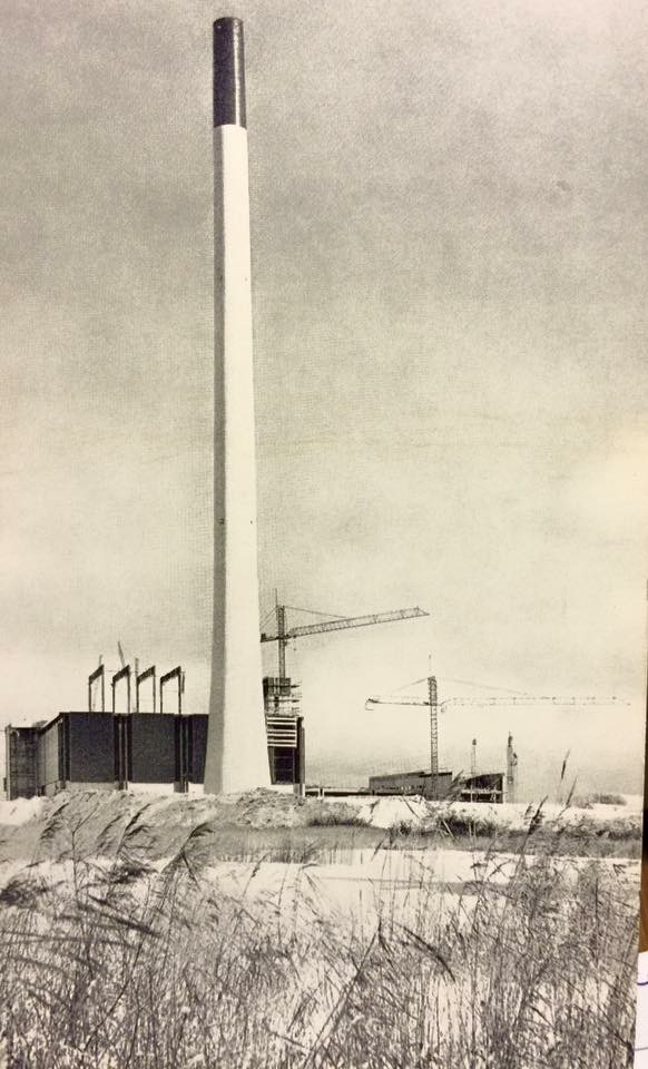 Vestforbrænding december 1969